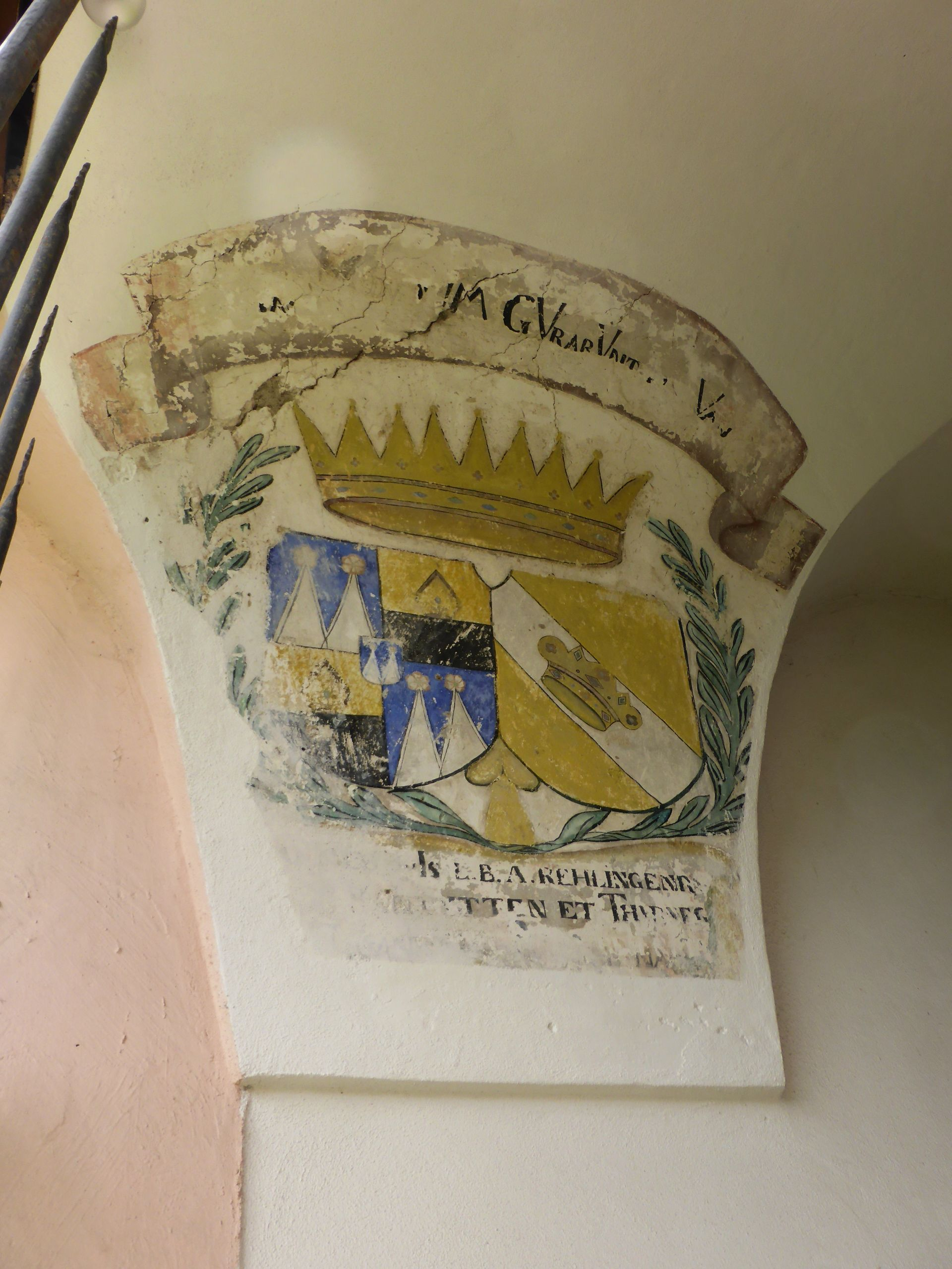 Gesamtanlage, Ehemaliges Schloss Radeck mit Schlosskapelle